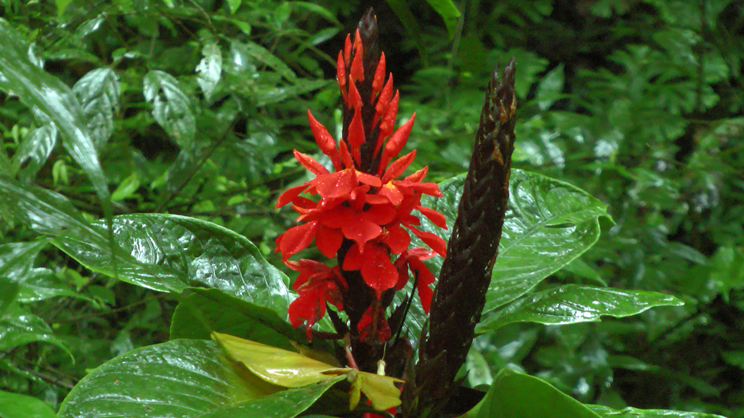 FLOR DE GUACAMAYO